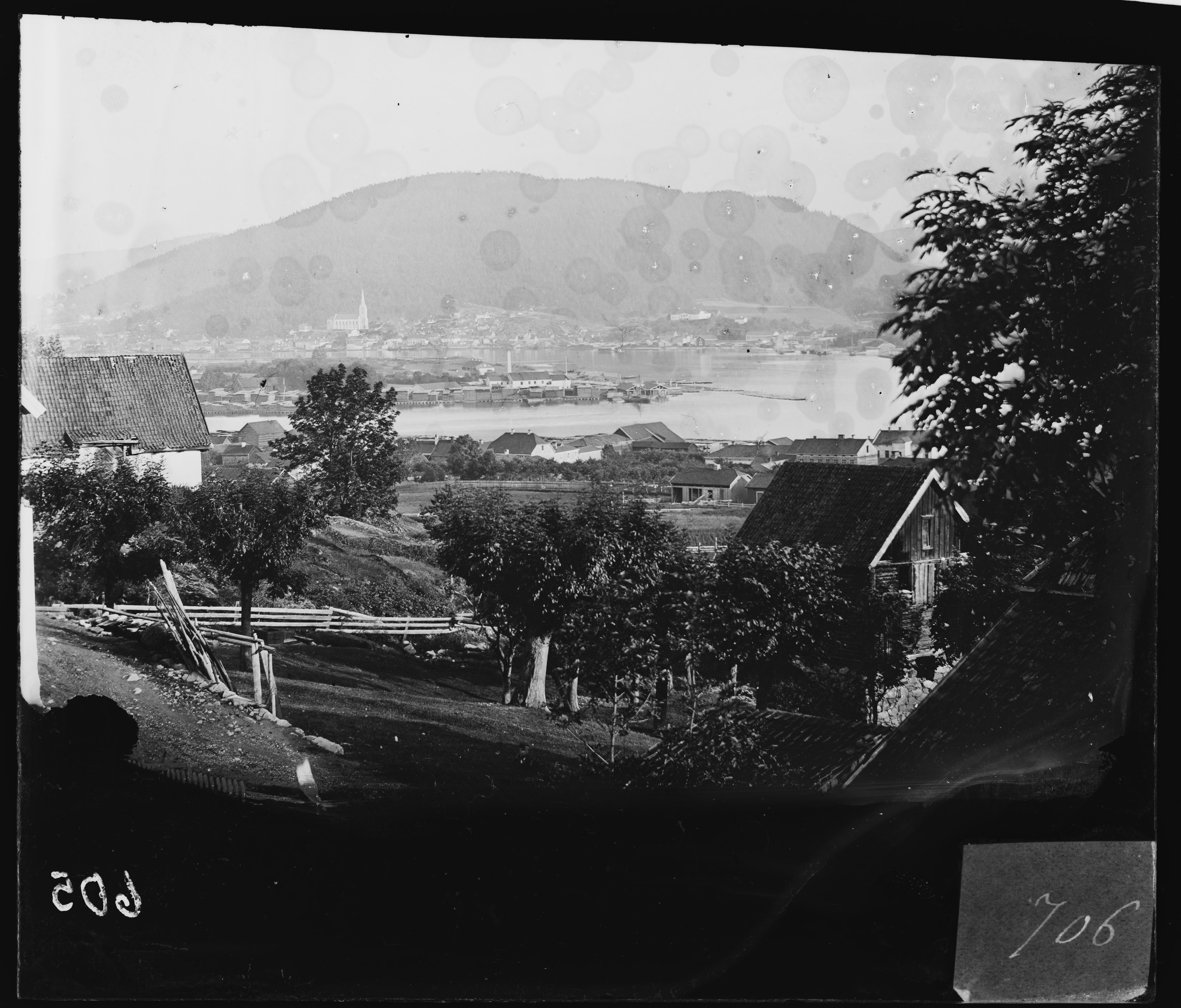 Sted: Drammen Kommune: Drammen Fylke: Buskerud Tagger